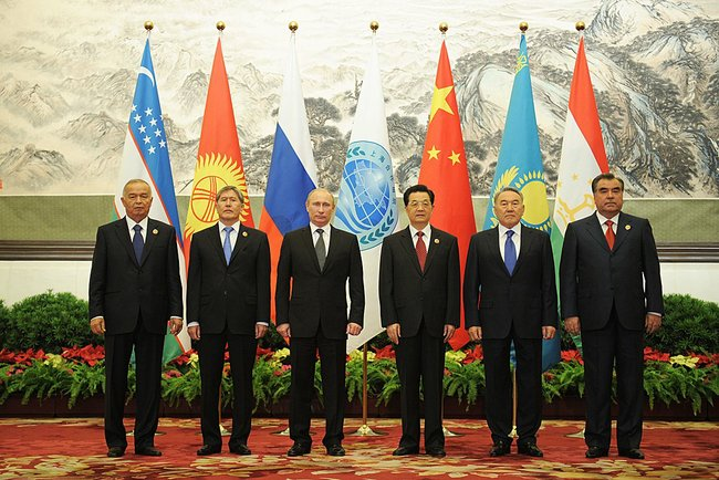 Государственный визит в Китай. Саммит ШОС. В Пекине состоялись российско-китайские переговоры, по итогам которых подписан пакет документов о сотрудничестве в различных областях. Владимир Путин также провёл серию встреч с руководством Китая. Кроме того, Президент России принял участие в работе саммита Шанхайской организации сотрудничества. На полях саммита состоялись встречи Владимира Путина с Президентом Ирана Махмудом Ахмадинежадом и Президентом Афганистана Хамидом Карзаем.